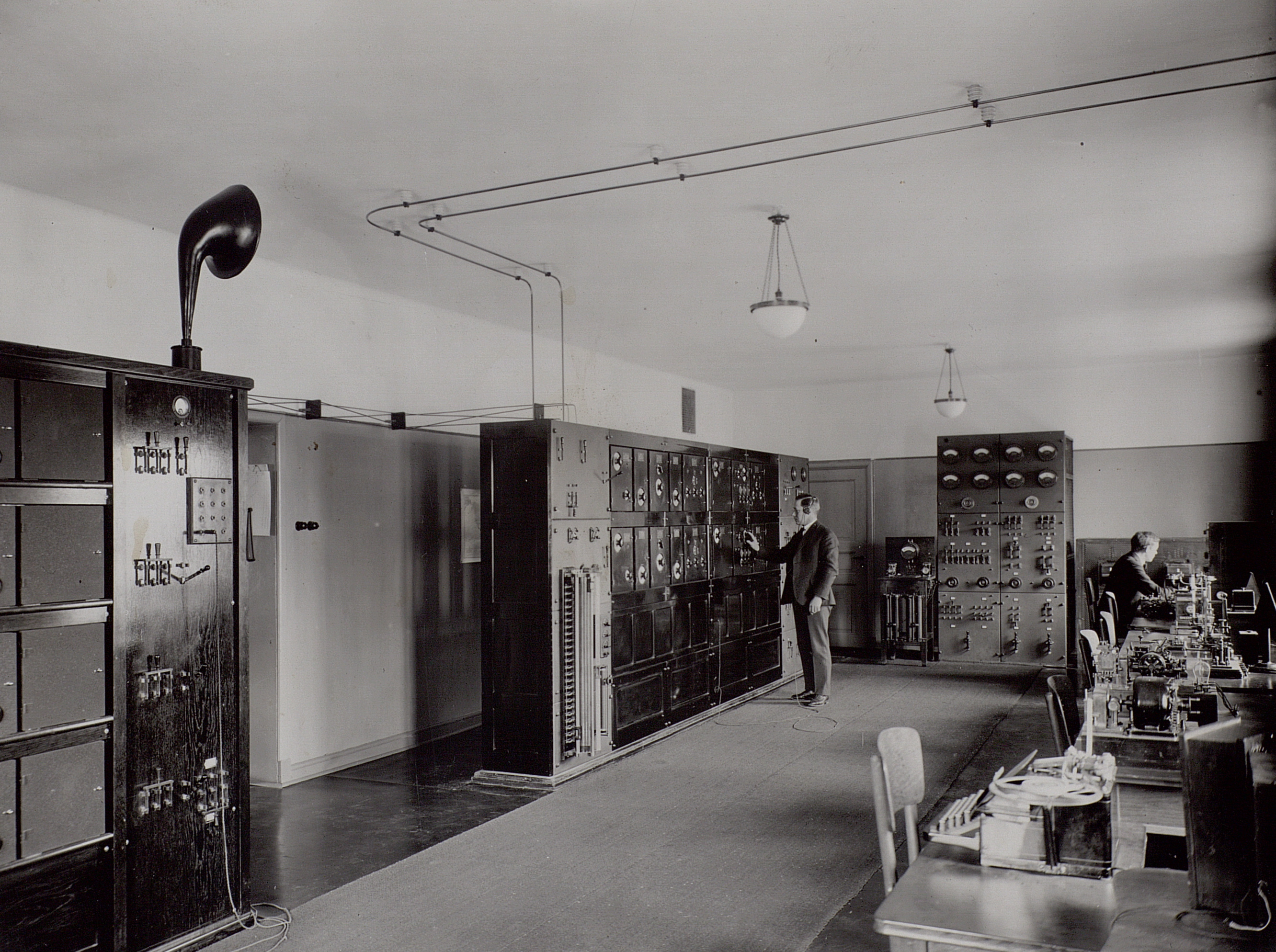 Kungsbacka, interiör från radiostationen. Två mottagare för amerikansk, fyra för europeisk radiotelegraftrafik.